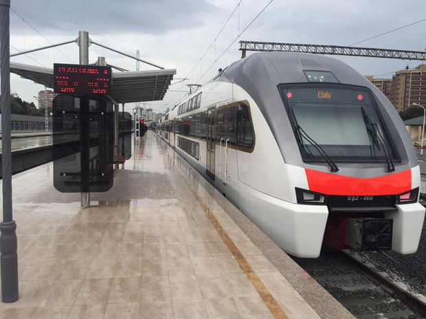 Bakü Sumqayıt hız treni